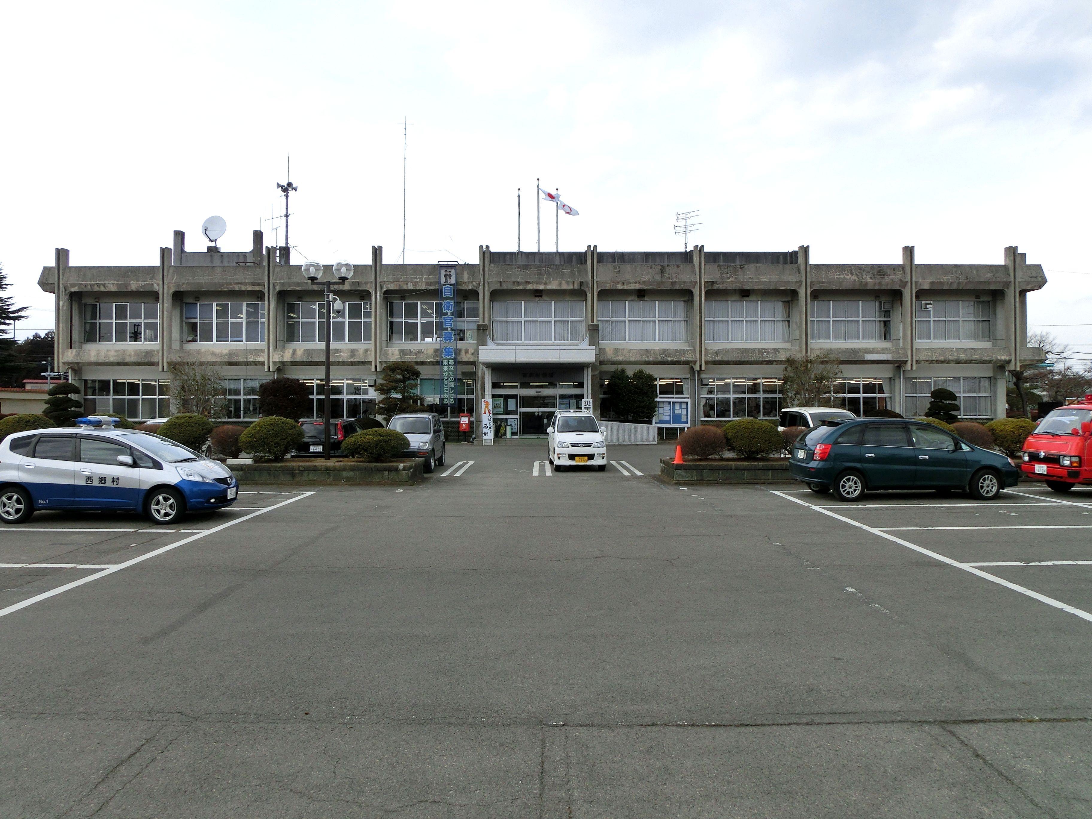 西郷村役場